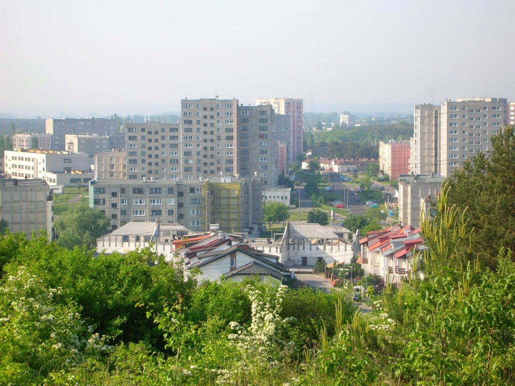 Widok os. Przylesie w Fordonie